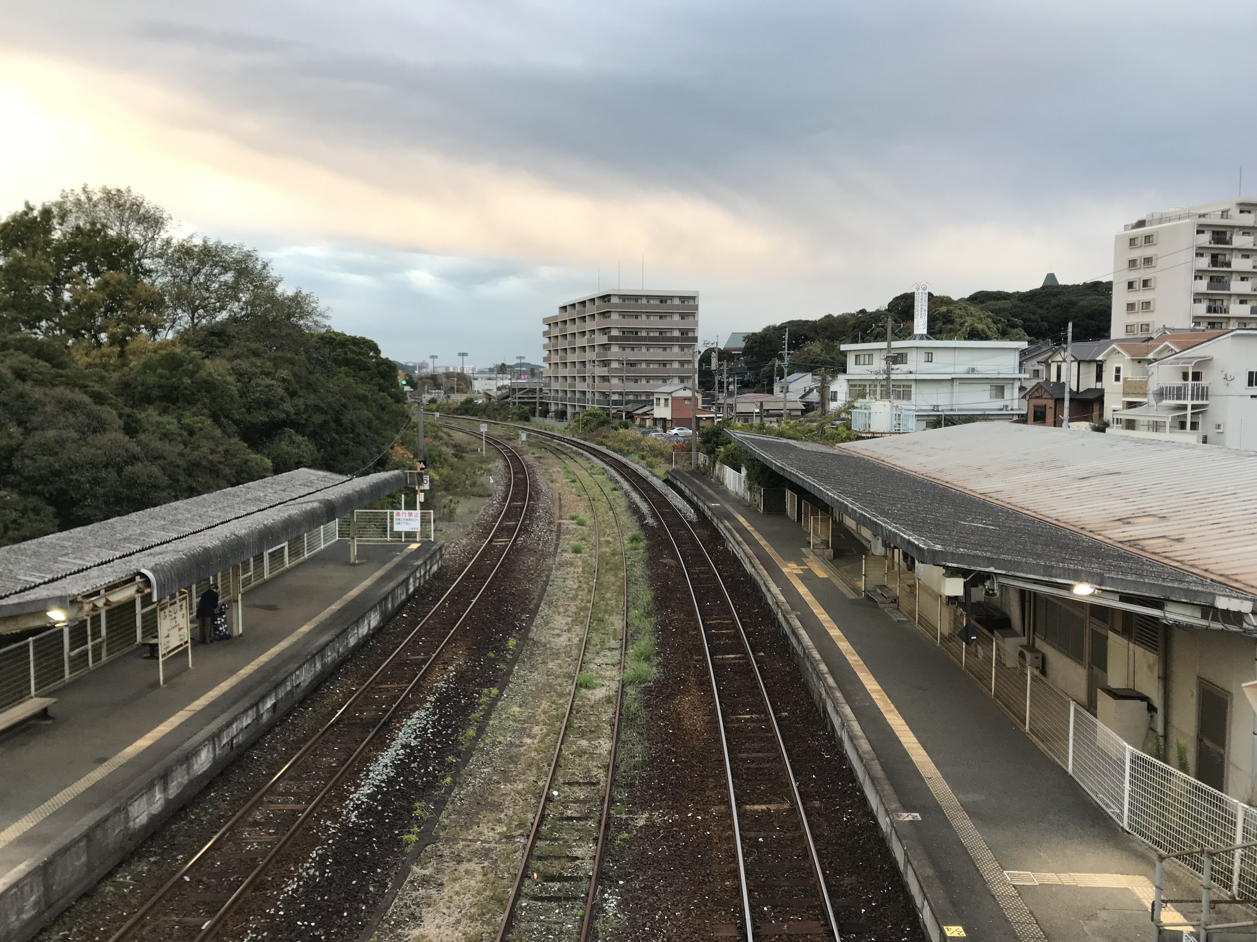 二島駅の跨線橋より望む駅構内。奥は本城方面